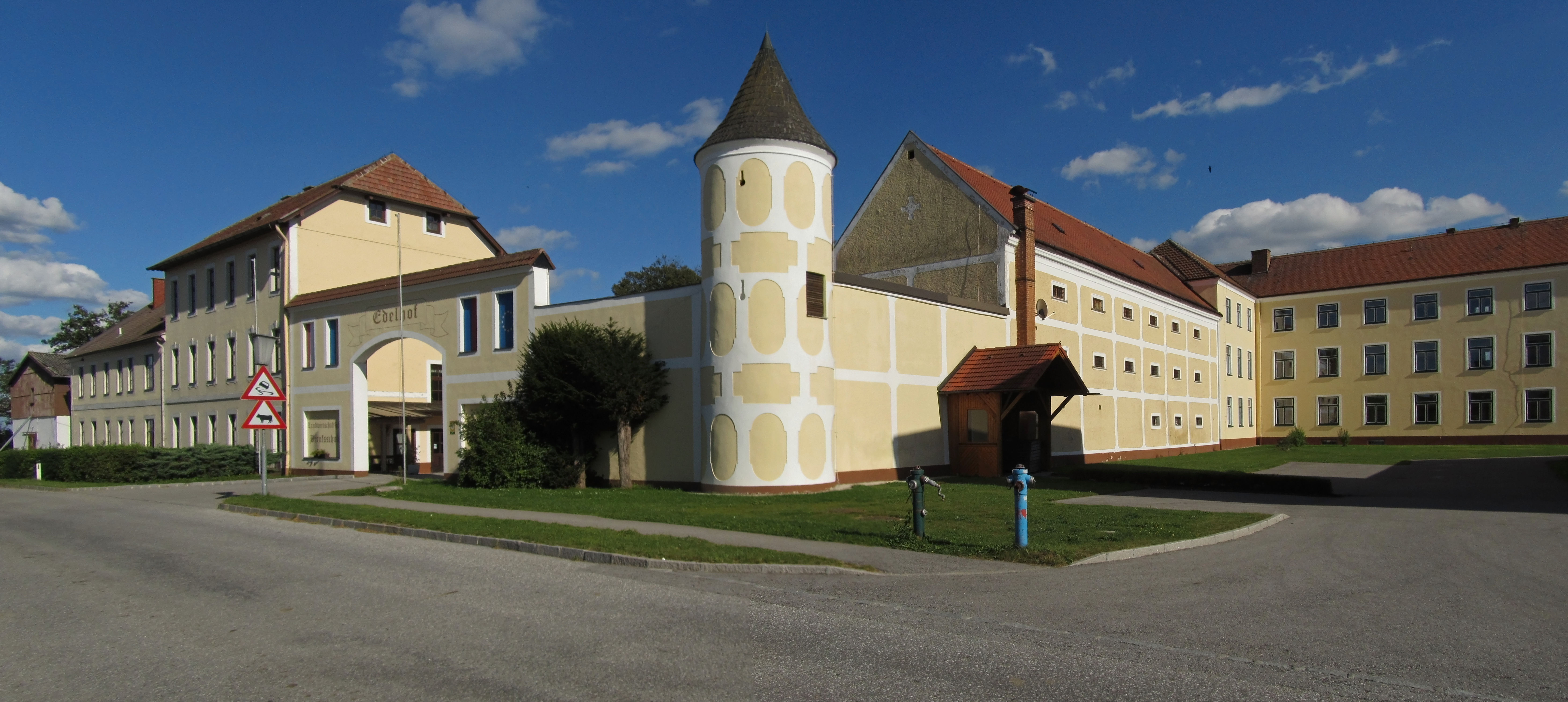 Der Edelhof ist ein ehemaliger Gutshof, der vom 12. Jahrhundert bis 1787 im Besitz des Stiftes Zwettl war und 1688 bis 1690 nach einem Brand neu aufgebaut wurde. Seit 1873 beherbergt er eine Landwirtschaftliche Fachschule.